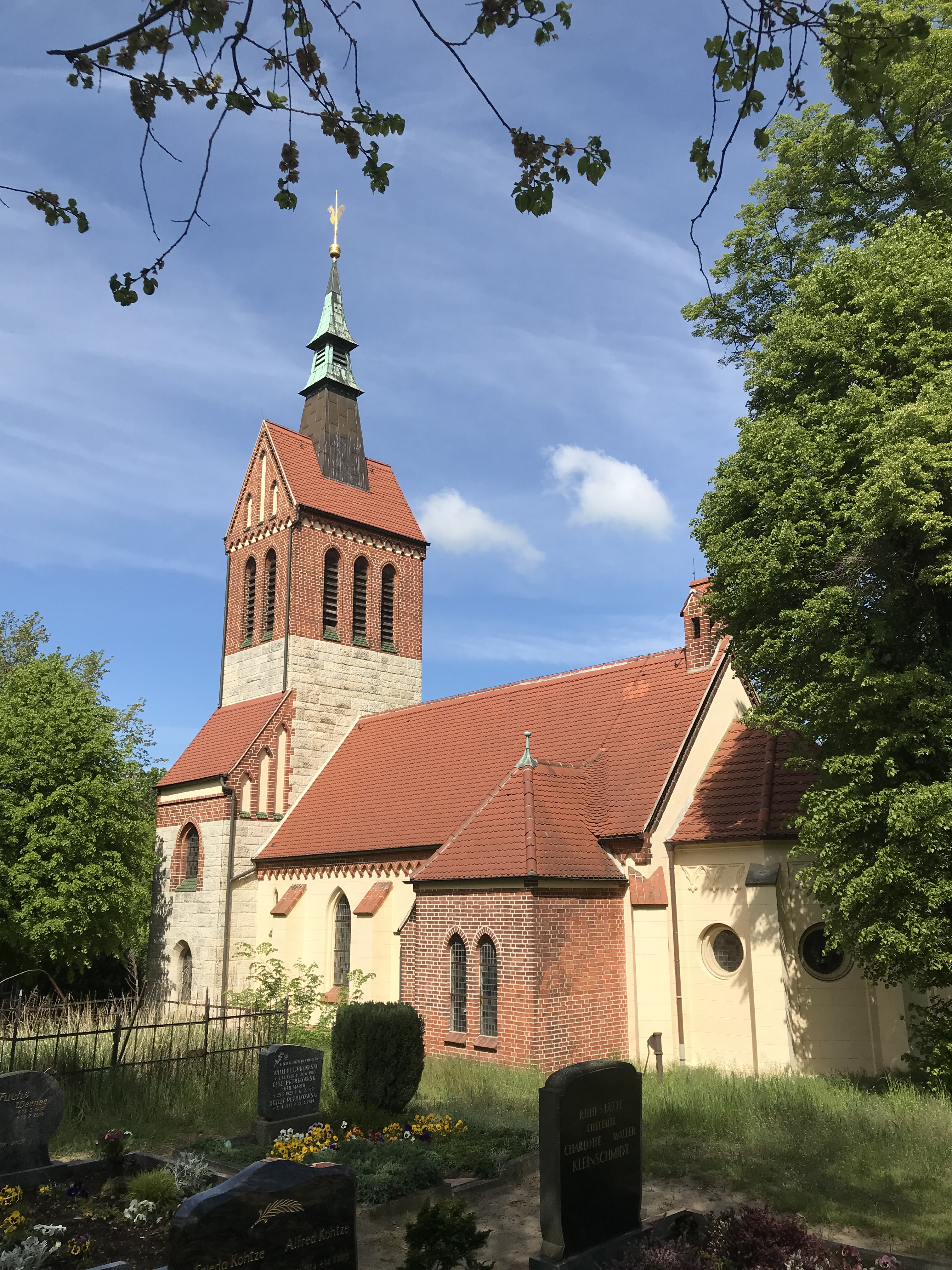 Die Dorfkirche Uetz in Uetz-Paaren der Stadt Potsdam ist eine neugotische Saalkirche aus den Jahren 1860/1870. Die Ausstattung ist bauzeitlich.